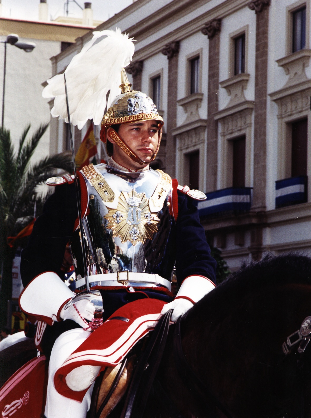 Coracero del EER